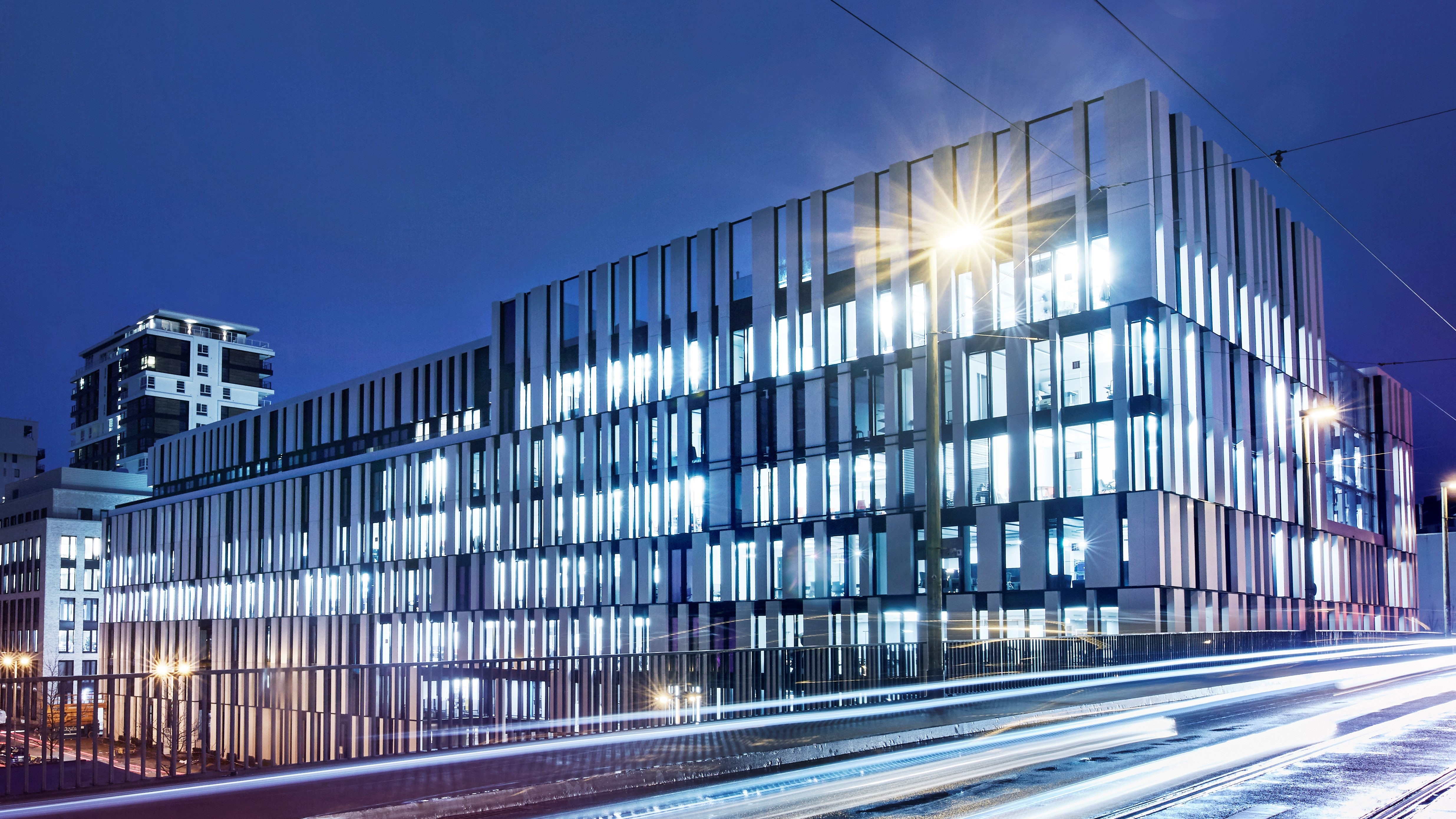 2018 ist die Handelsblatt Media Group in ein neues Gebäude an der Toulouser Allee in Düsseldorf gezogen.